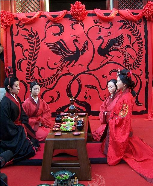 dynastie Zhou style mariage cérémonie